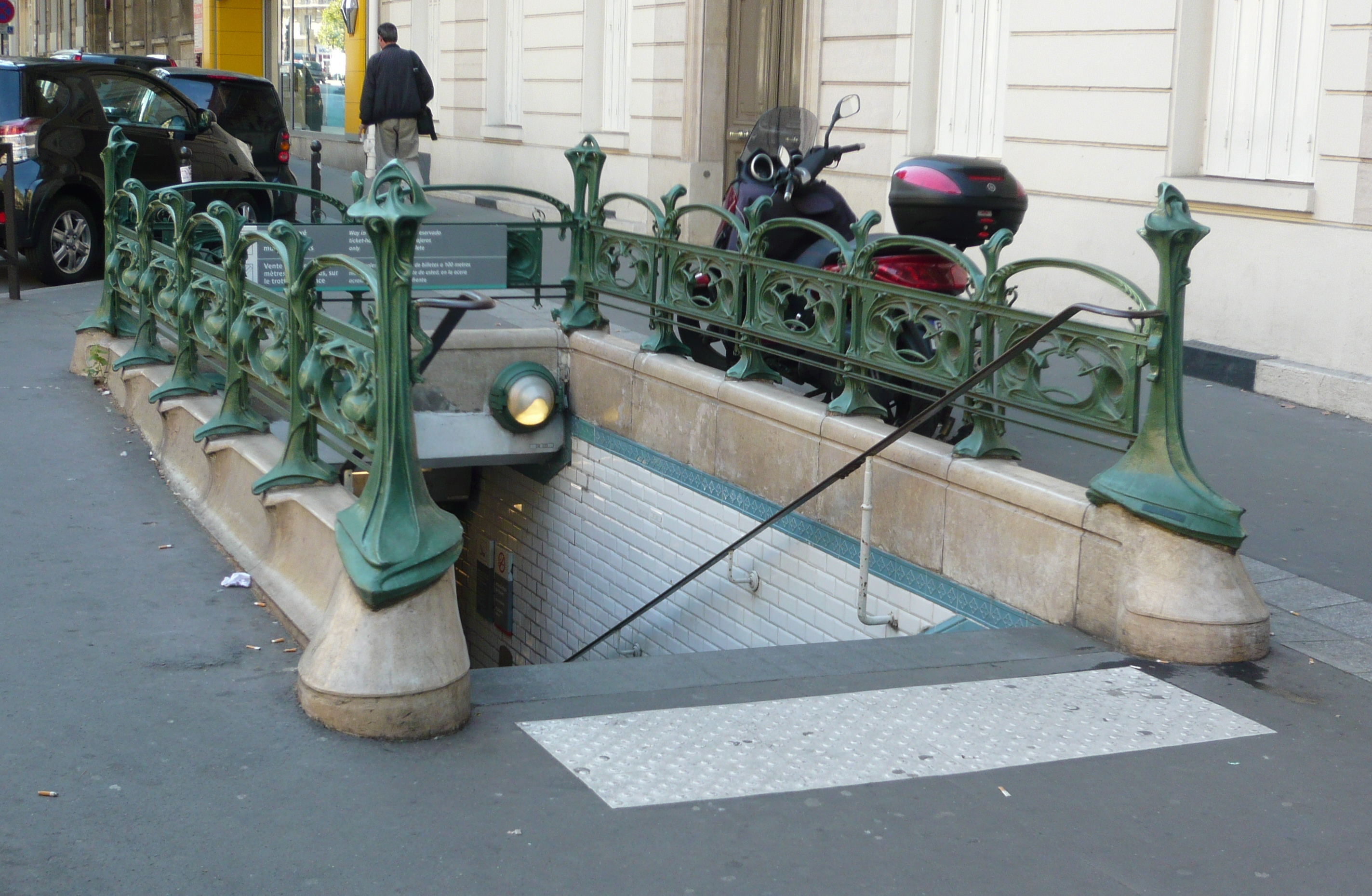 Edicule Guimard Métro Villiers